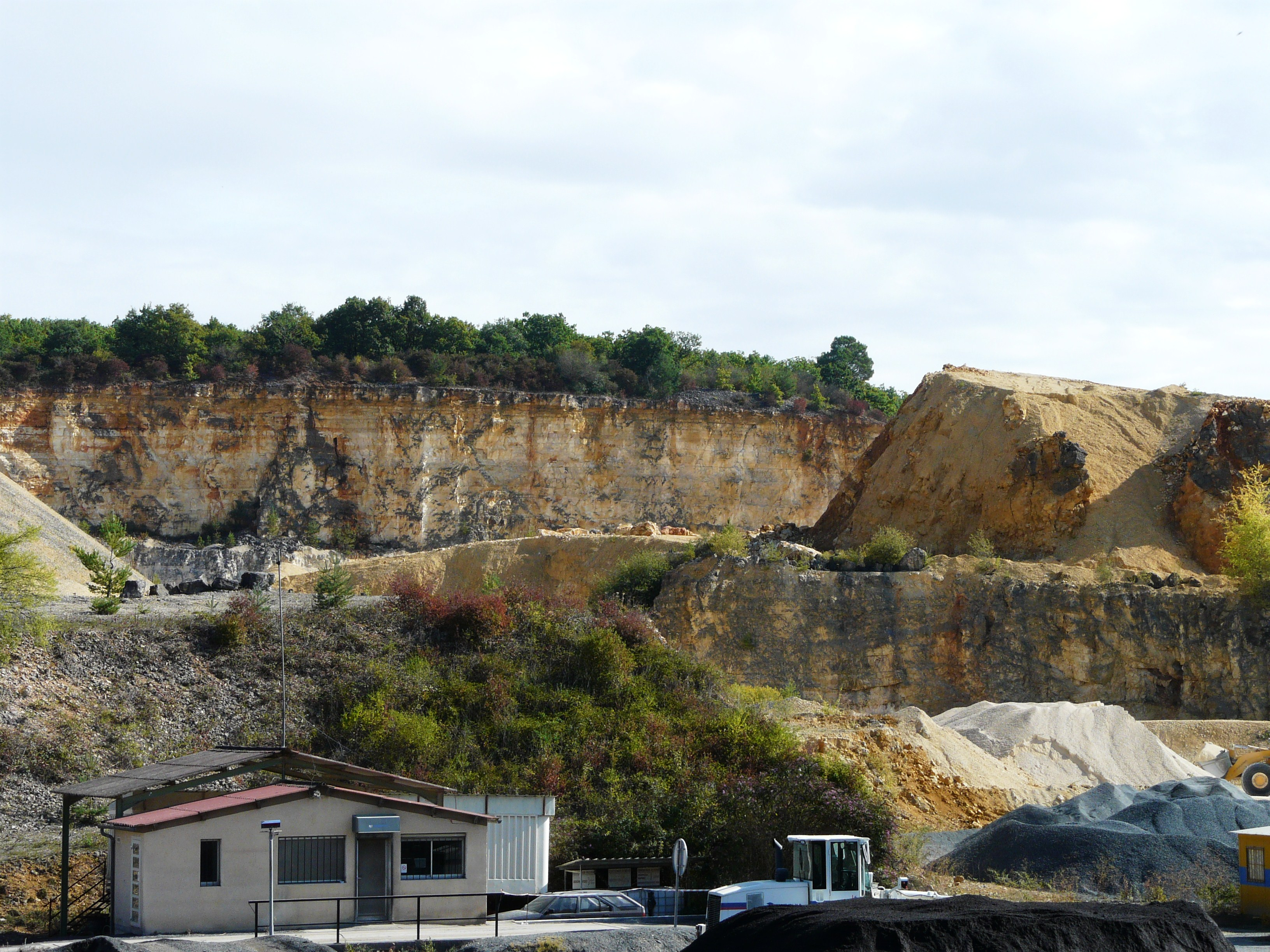 Carrière de calcaire, Savignac-les-Églises, Dordogne, France